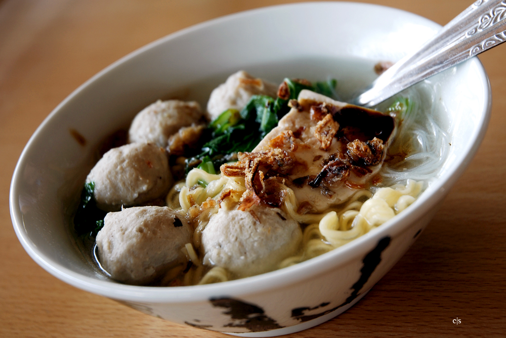 Bakso sapi